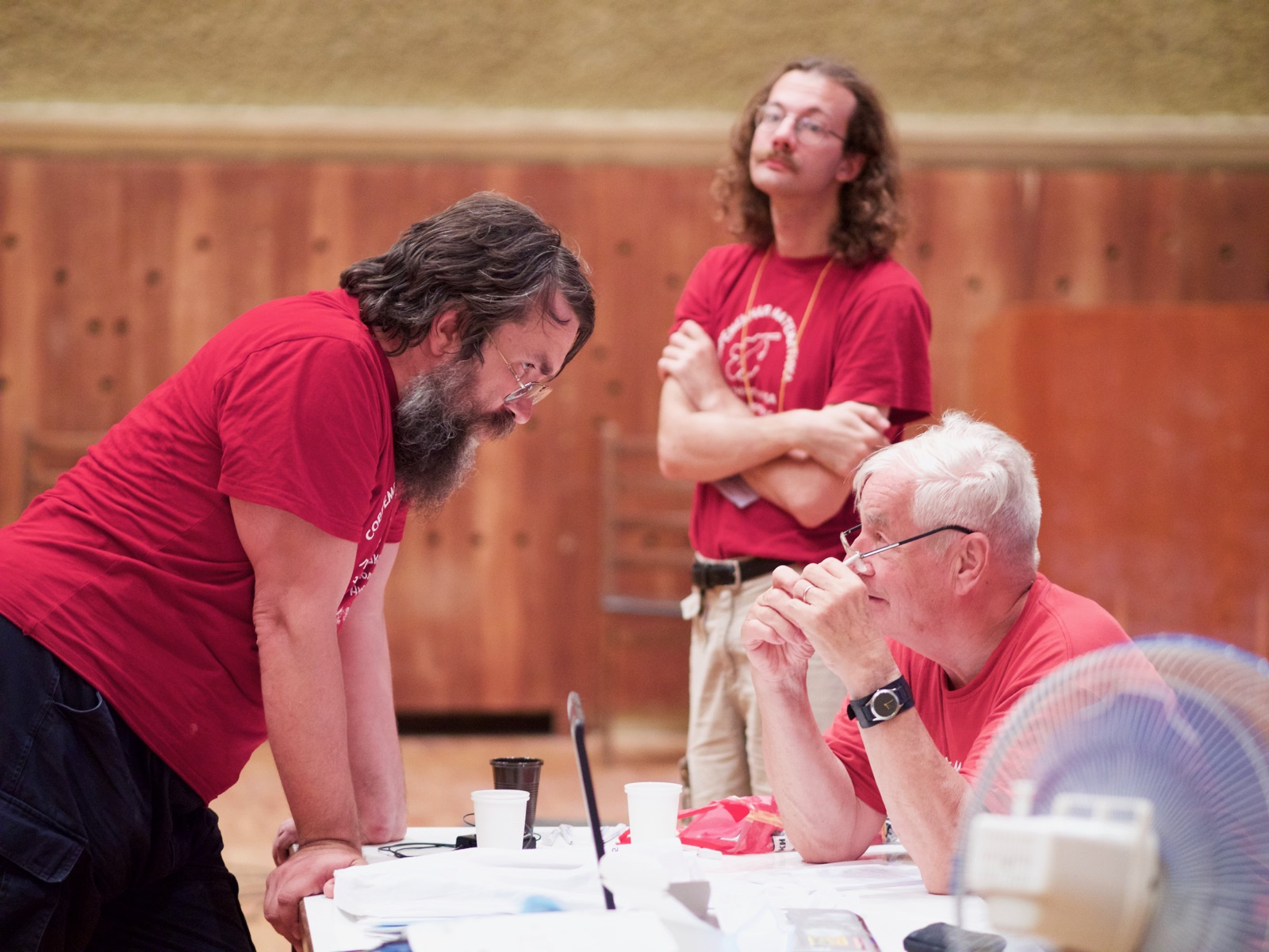 В. Д. Арнольд (слева), В. А. Клепцын (по центру) и А. Б. Сосинский, Летняя школа «Современная математика», 2016 год